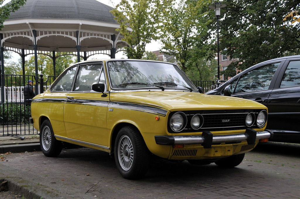 De 66 was uitgerust met een 1100 cc grote Renaultmotor die goed was voor een topsnelheid van 135 km/u. De Marathon-versie had een sterkere 1300 cc motor, waarmee de topsnelheid opkroop naar 145 km/u. De De Dion-achteras zorgde voor stabieler weggedrag dan de oude pendelasophanging en had ook de vertrouwde Variomatic. Het was het op één-na-laatste model van DAF (voor de 46) vóór de overname door Volvo, die het model als Volvo 66 bleef produceren. The DAF 66 is a small motor vehicle that was produced by the Dutch company DAF in the 1970s. It was an evolution of the DAF 55 it replaced and like its predecessor used a 46 bhp (34 kW) Renault Cléon engine.